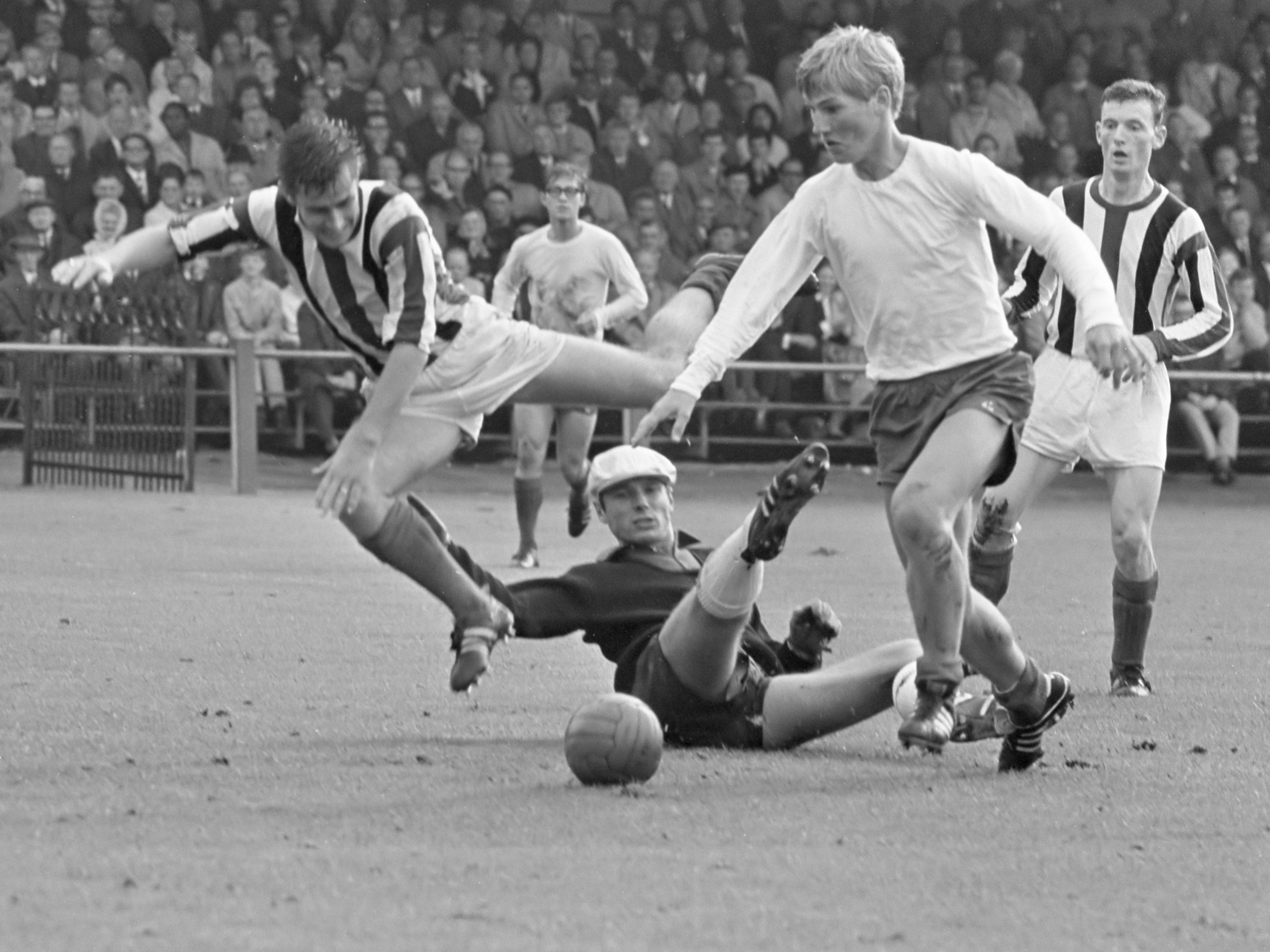 Van Breevoort (Blauw-Wit) scoort, keeper Bravenboer is verslagen 22 september 1968